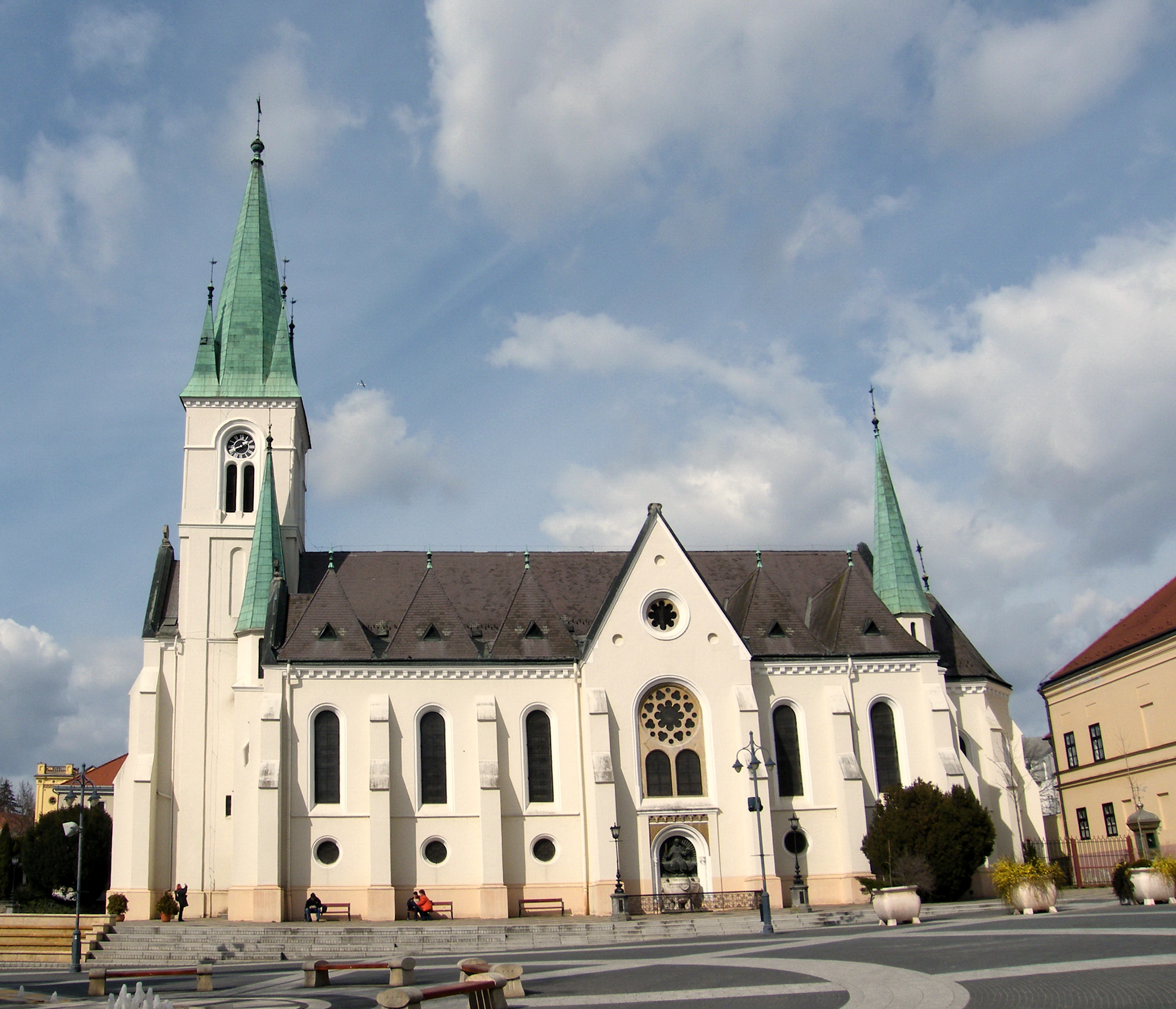 Kaposvár, Nagyboldogasszony Székesegyház